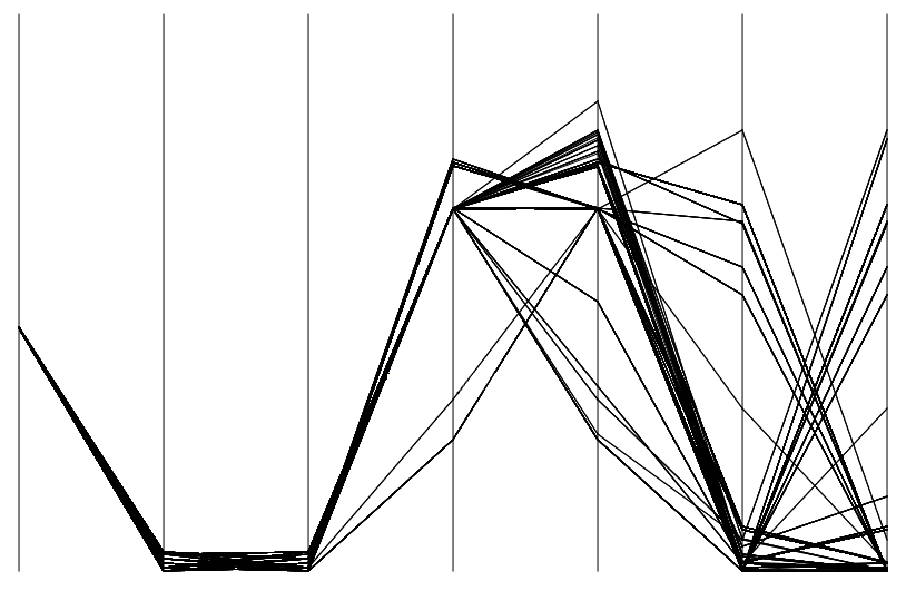 Image:Picviz-0.1.png cropped